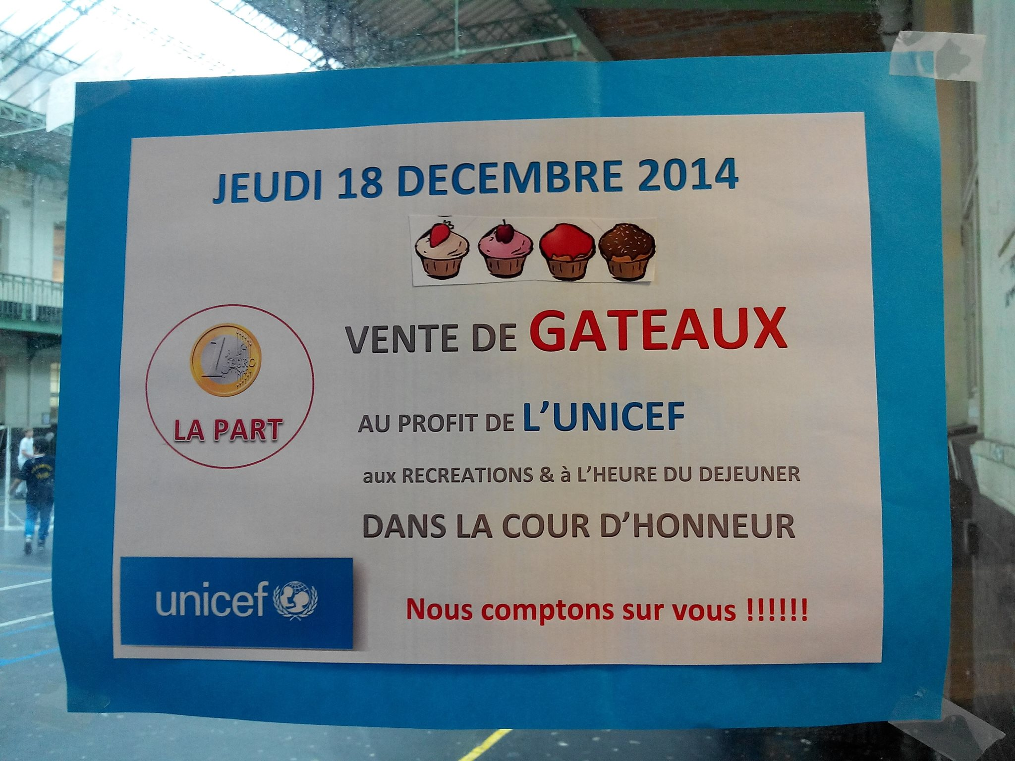 vente de gateaux UNICEF